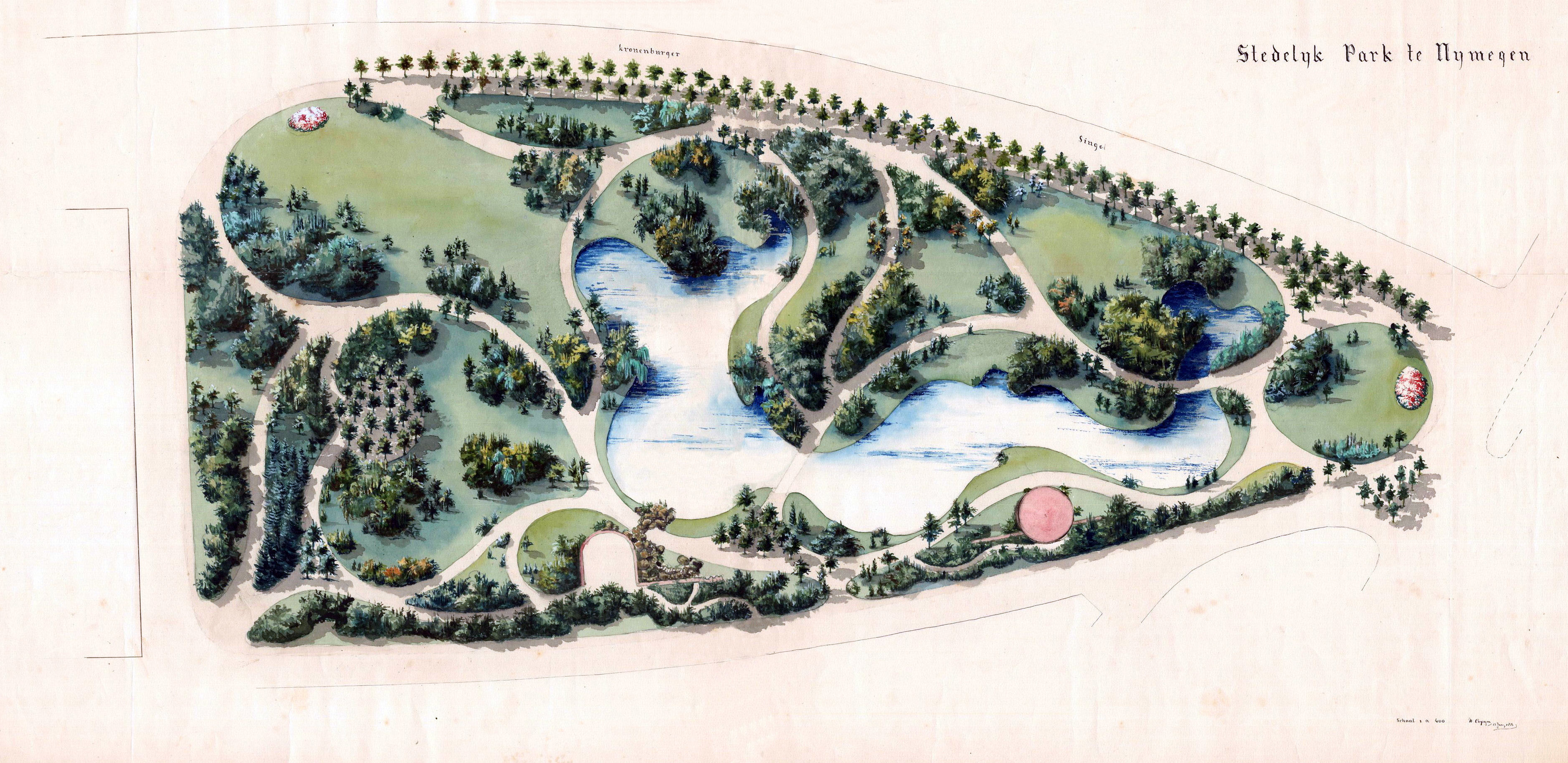 KRONENBURGERPARK: Exterieur TEKENING, ONTWERP VAN COPIJN (1880)